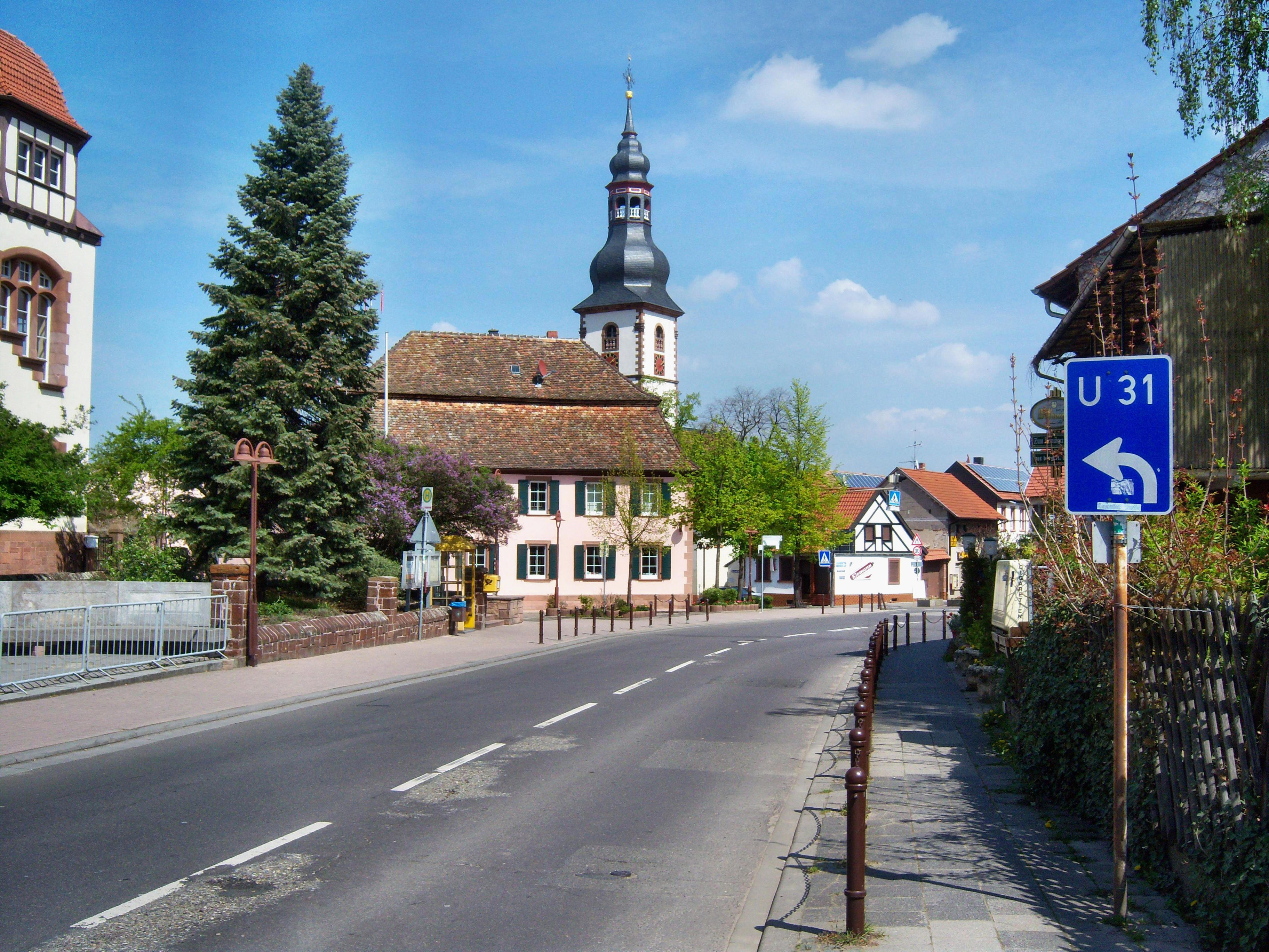 Die Kleinkarlbacher Straße (L 520) in Kirchheim an der Weinstraße, neben der Bundesstraße 271 eine der Hauptstraßen von Kirchheim an der Weinstraße